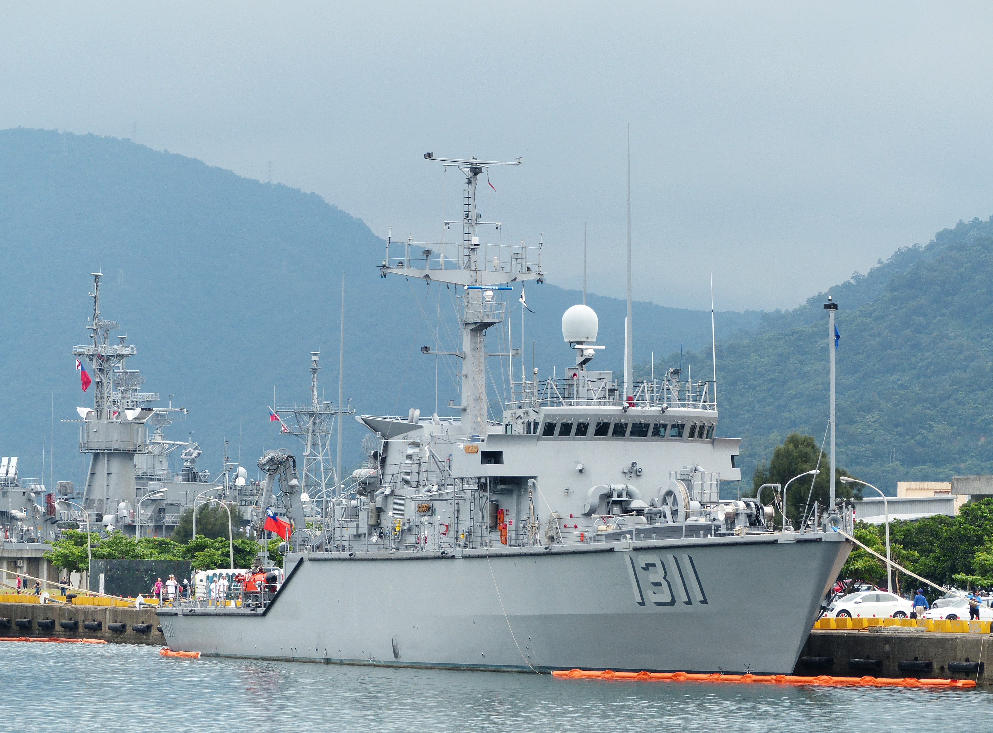 停泊中正軍港7號碼頭的永靖級獵雷艦永安（MHC-1311）。